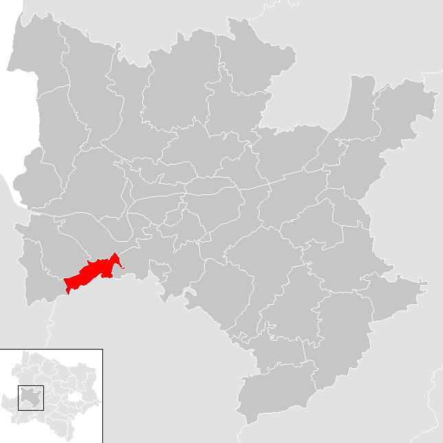 Bezirk Melk